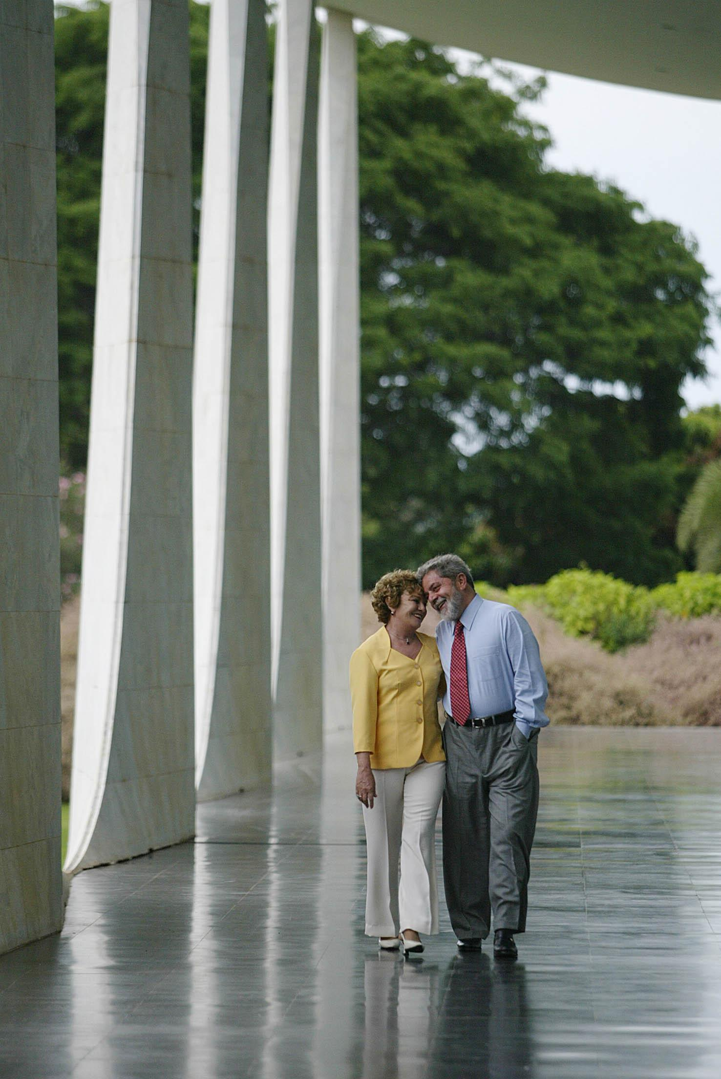 Brasília - Com a mulher, Marisa Letícia, no Palácio da Alvorada. Brasília (DF), em 23 de outubro de 2003 - (Fotos do livro "Lula - 500 Dias em Fotos" /Foto: Ricardo Stuckert/PR